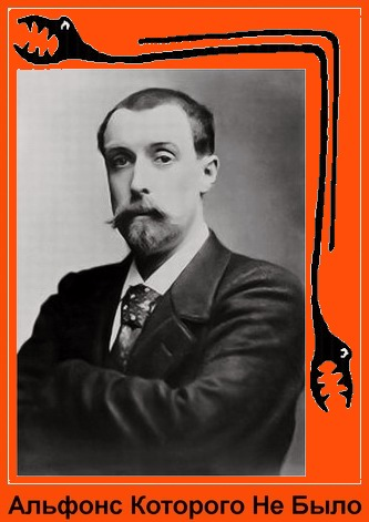 Альфонс Алле (35 лет) с фотокарточки, фотография и графика из книги "Альфонс, которого не было" (стр.70) Центр Средней Музыки" & Лики России, С-Петербург, 2013 год